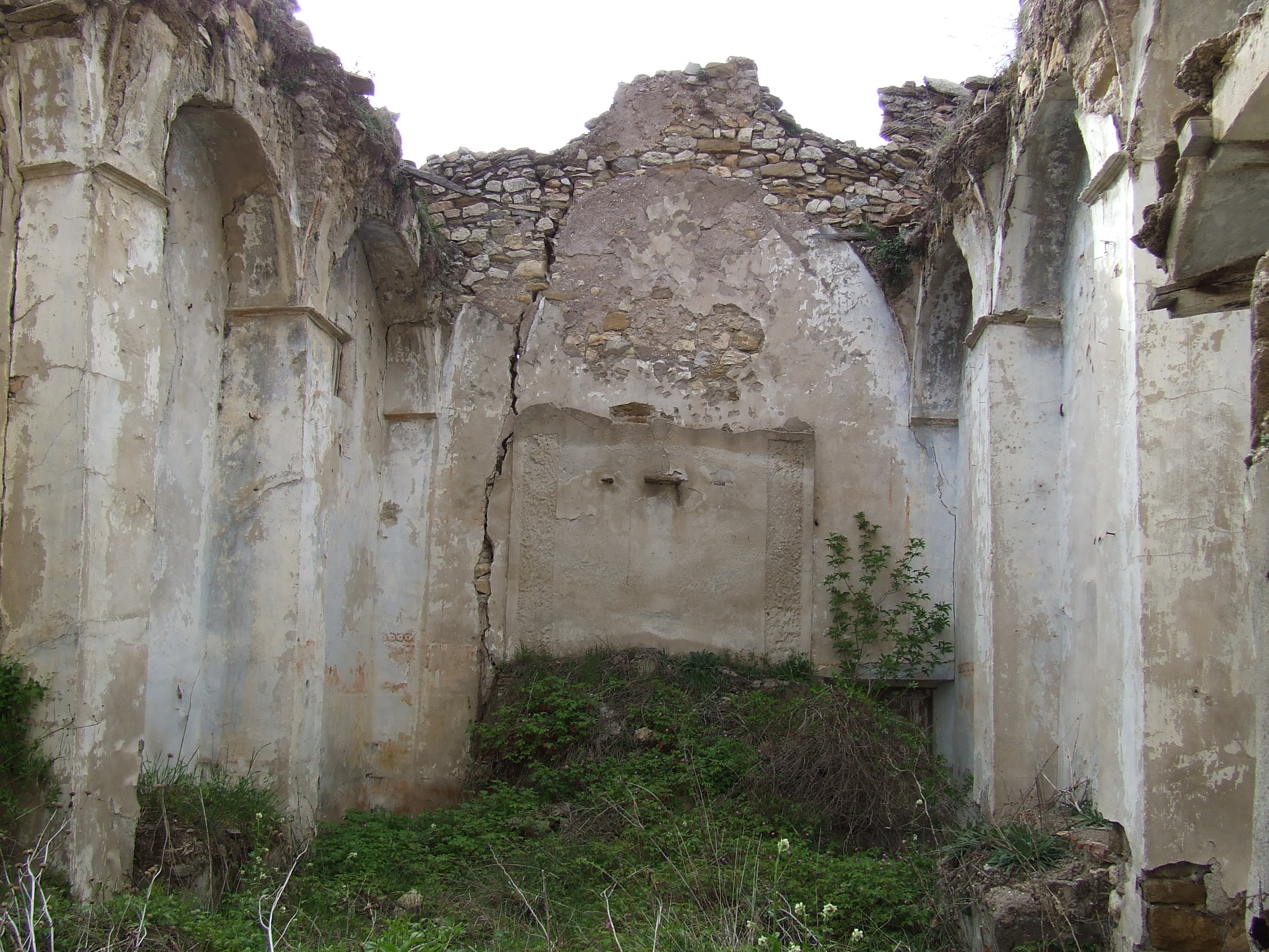 Ruïnes de Sant Esteve d'Alsamora (Sant Esteve de la Sarga, Pallars Jussà)